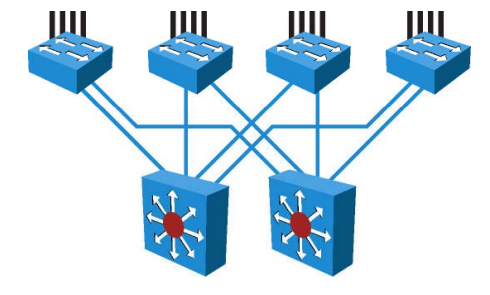 Монгол: zsfdgs